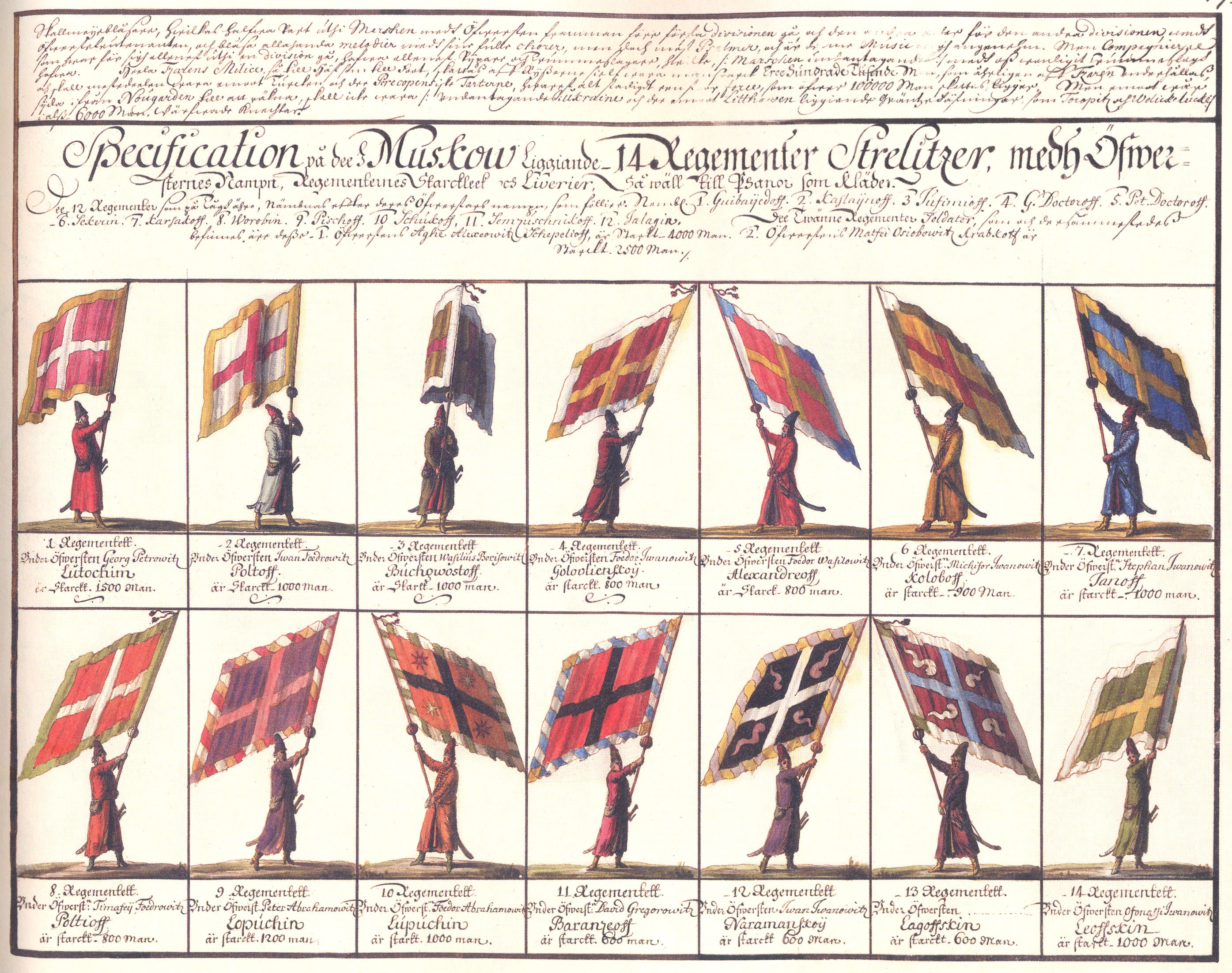 Перечень 14 стрелецких полков, расположенных в Москве.